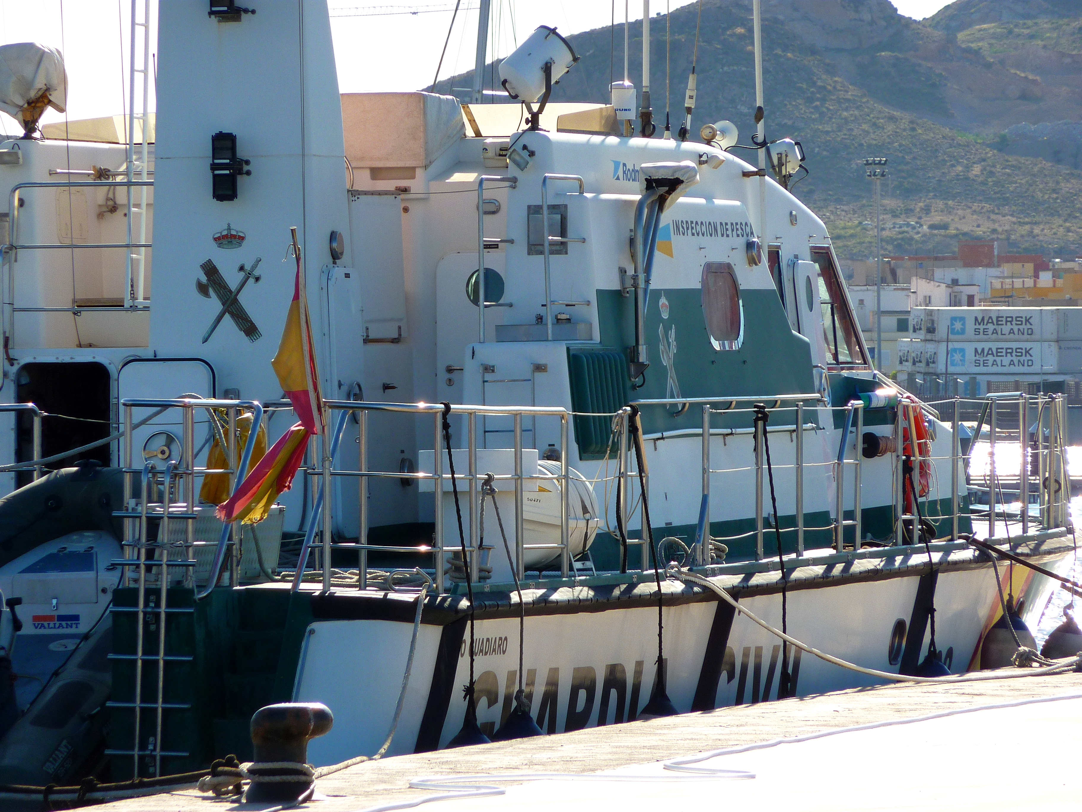 Patrullera clase Rodman-82 Río Guadiaro, A02, del Servicio Marítimo de la Guardia Civil.